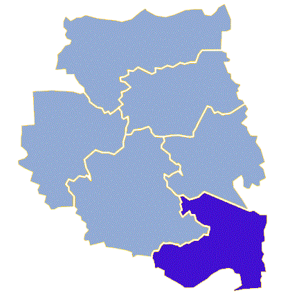 Powiat międzyrzecki, gmina Trzciel